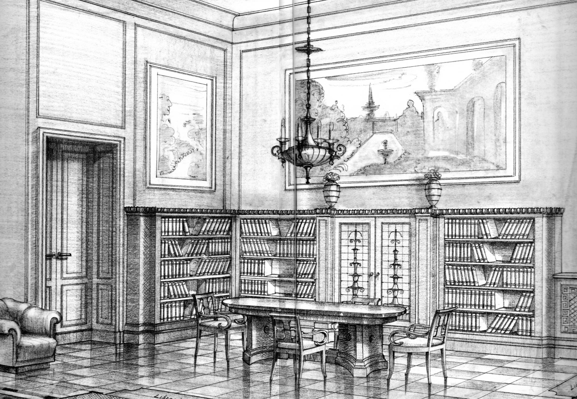 Progetto definitivo arredo sede Banca d'Italia a Brescia eseguito da Ambrogio Fossati nel 1932. Inventario n.157 eredi Fossati.